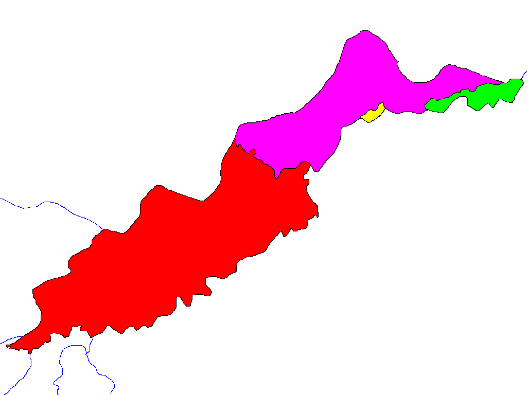 Pedair ynys Ilha Tupinambarana.